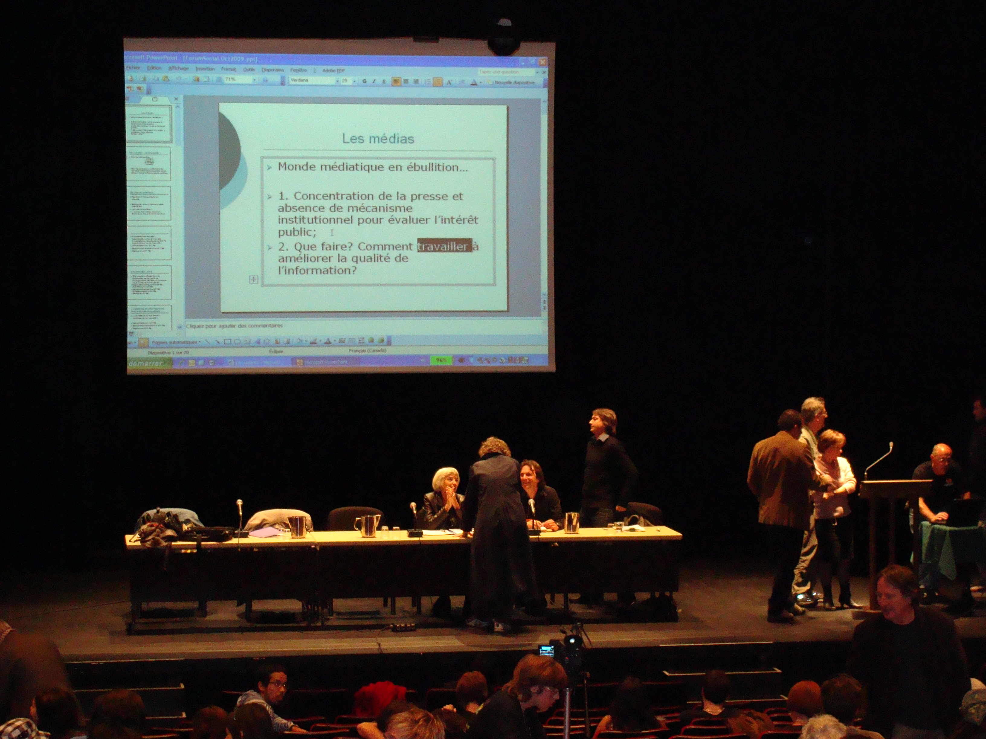 Conférence sur la privatisation du savoir à la salle Marie Gérin-Lajoie, à l'UQAM, dans le cadre du Forum social québécois.